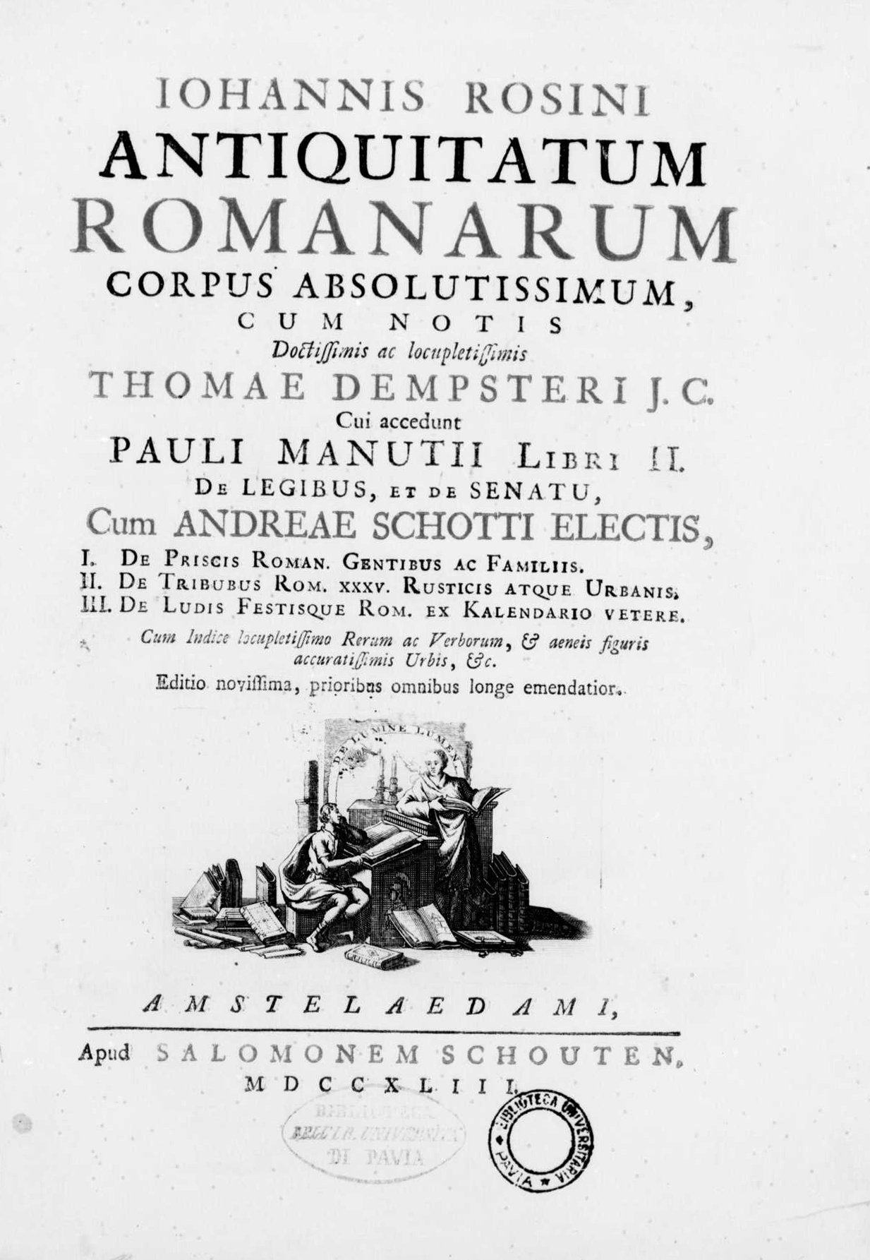 Frontespizio